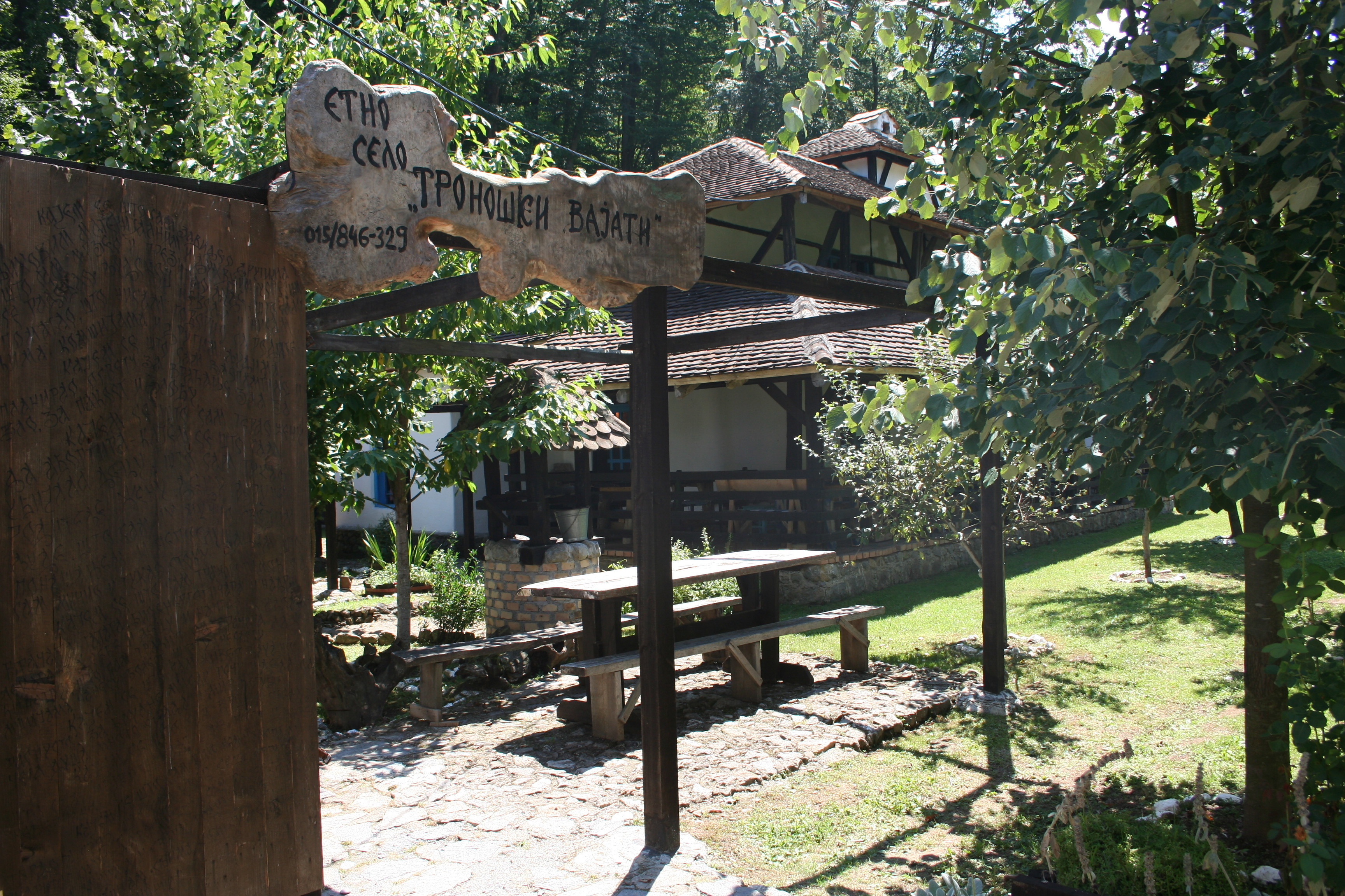 Etno selo, Korenita